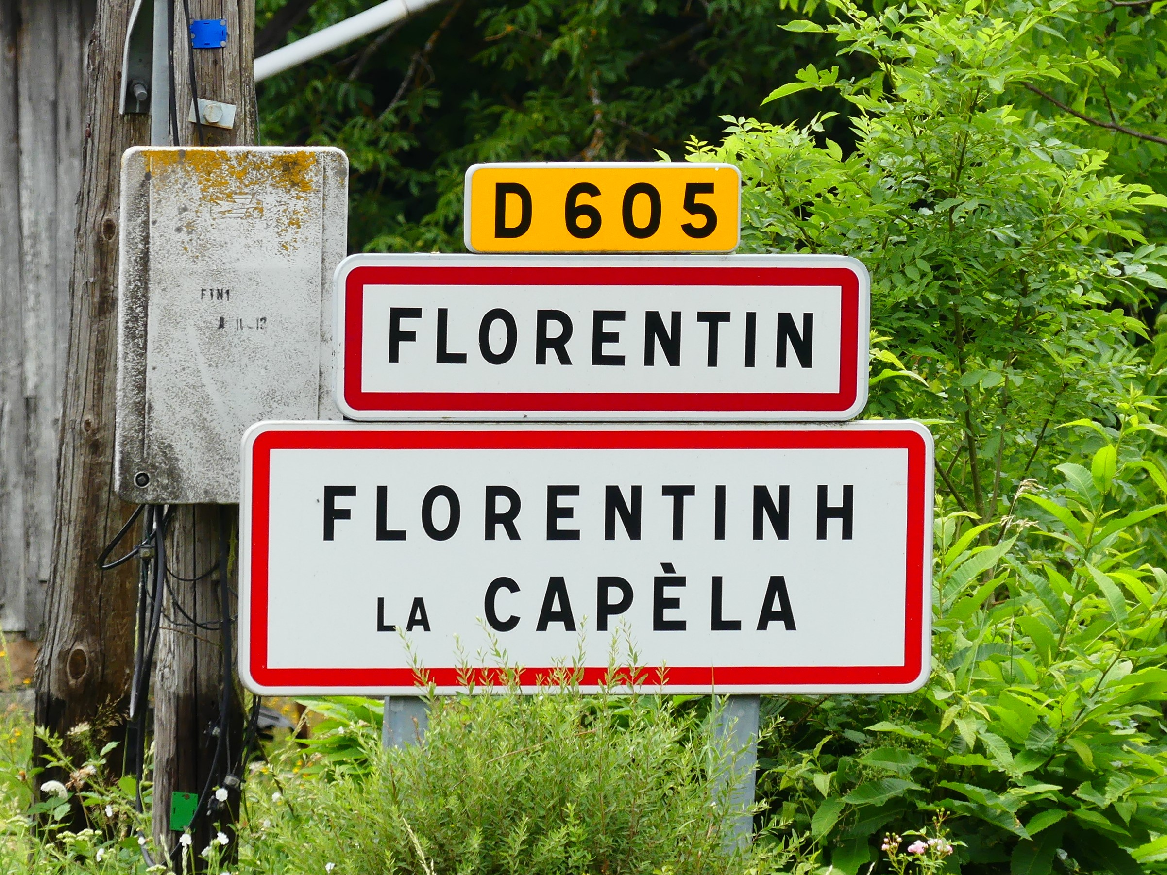 Panneau d'entrée dans le bourg de Florentin, Florentin-la-Capelle, Aveyron, France.